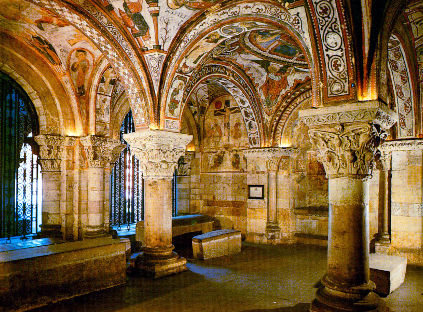 Panteon kraljeva od Leona